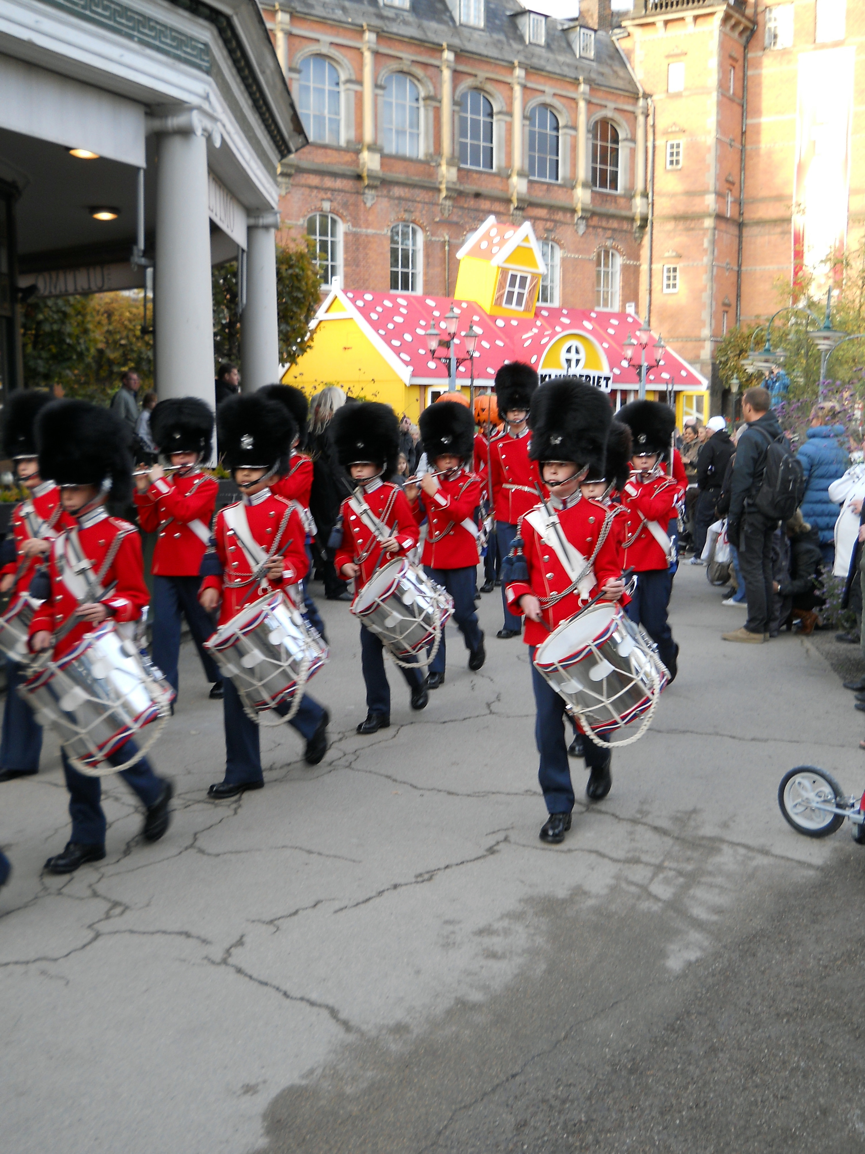 Tivoligarden spiller musik